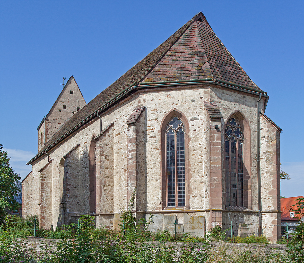 Evangelische Kirche in Langenholzhausen (Kalletal), Rückseite This is the photograph of an architectural monument. It is part of the list of cultural monuments of Kalletal, no. 12